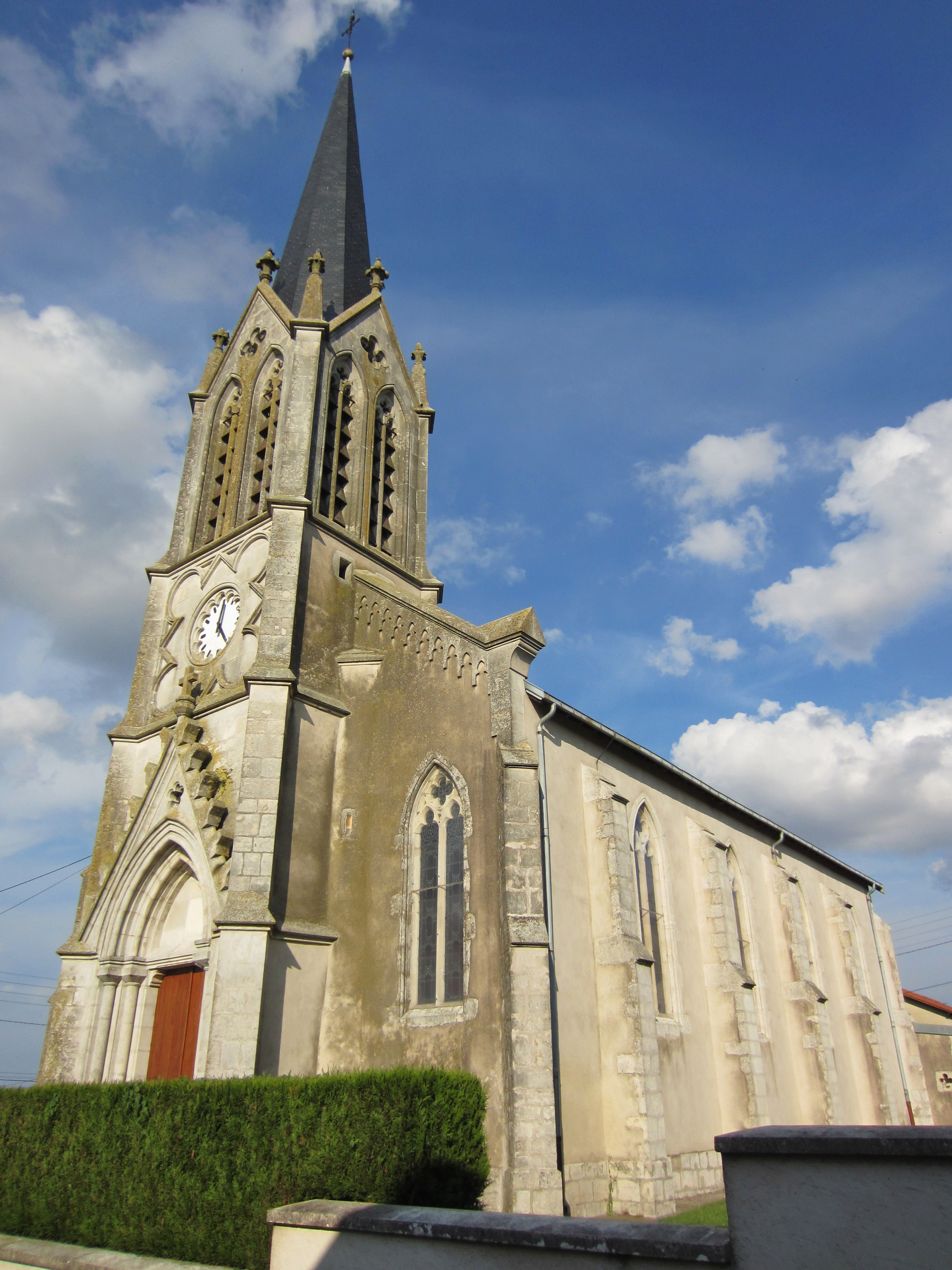 Description eglise Lironville Date27 September 2011Sourcemon appareil photoAuthorAimelaimePermission (Reusing this file) eglise Lironville